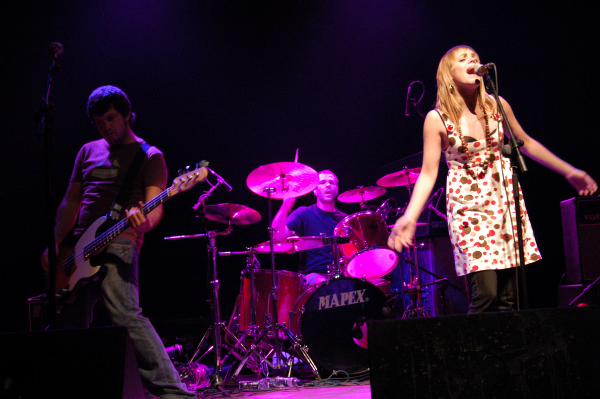 Nun taldea Bilboko Kafe Antzokian